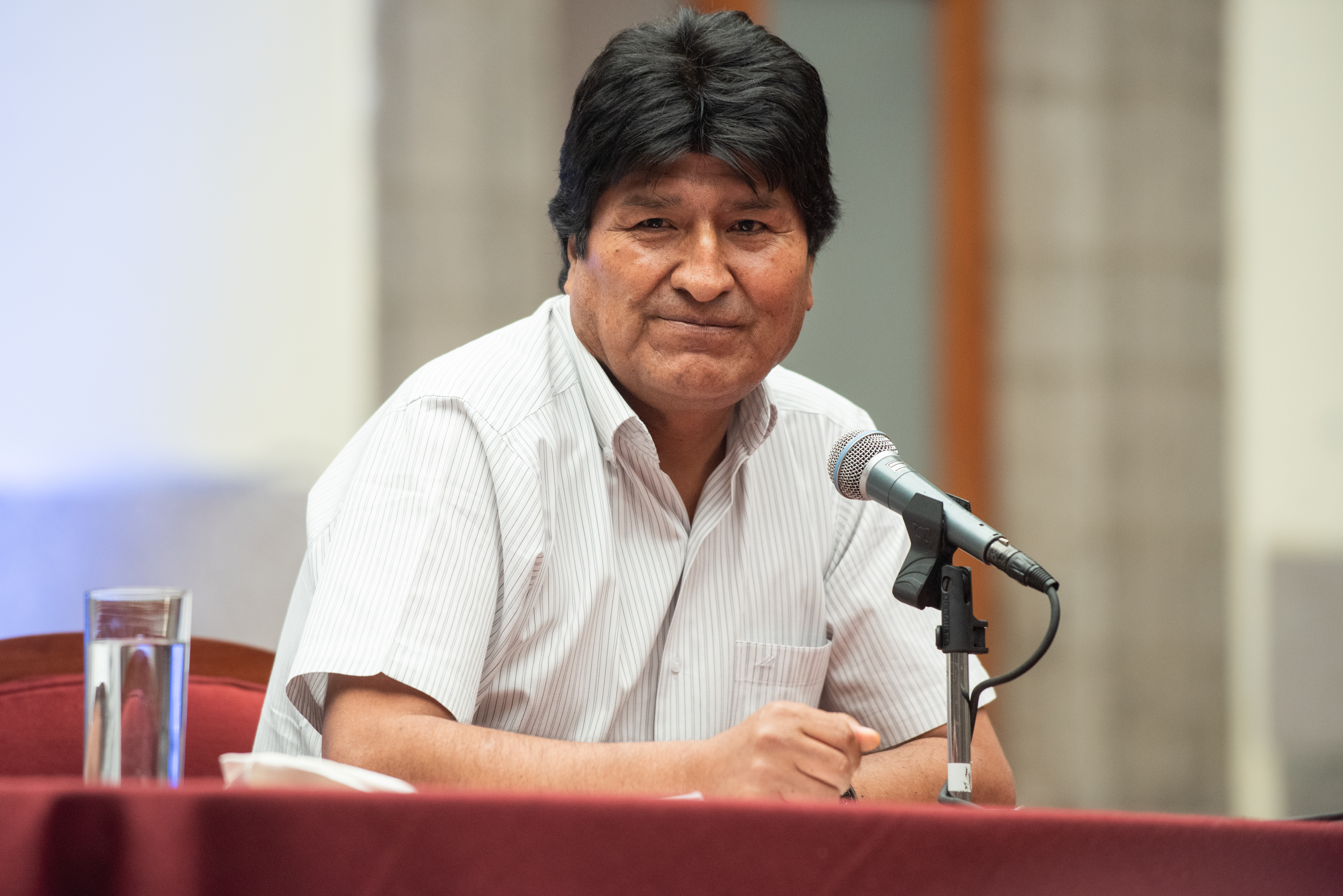 El político boliviano en conferencia de prensa en el Museo de la Ciudad de México.